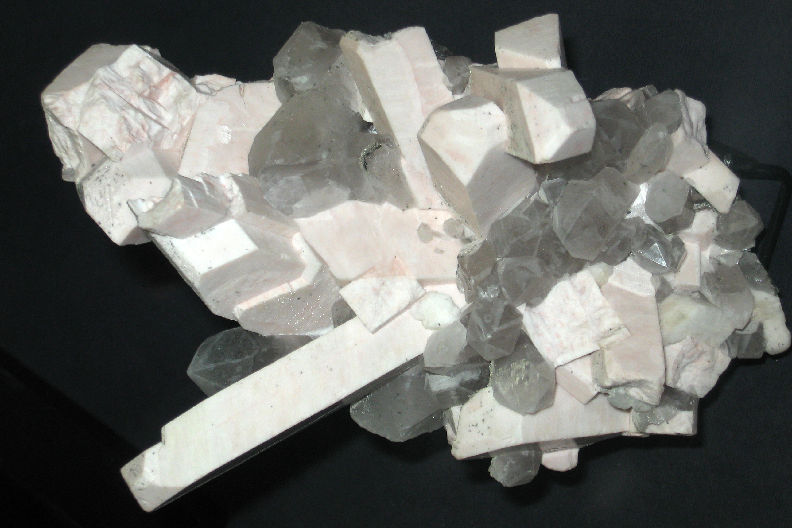 Ortoclasio.